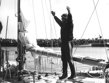 Kapitan Henryk Jaskuła wpływa do portu w Gdyni Zdjęcie pochodzi z prywatnego archiwum Henryka Jaskuły Zdjęcie zostało udostępnione przez magazyn wodniaków Port21.pl